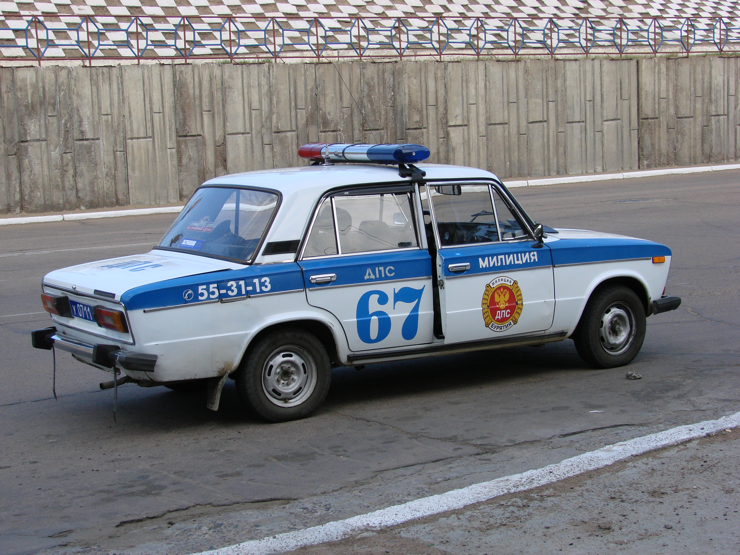 Police Lada in Vladivostok